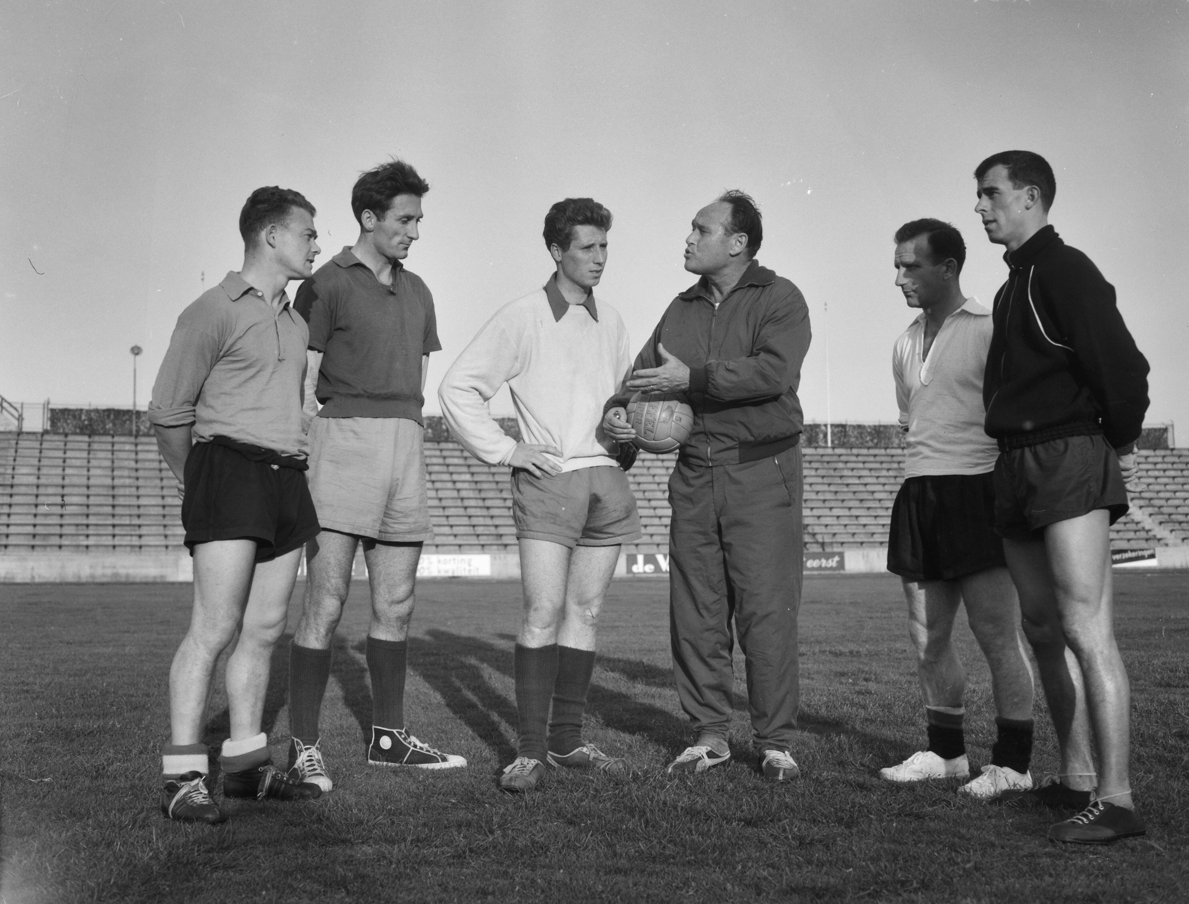 Collectie / Archief : Fotocollectie Anefo Reportage / Serie : Centrale training van het Nederlands elftal Beschrijving : V.l.n.r. P. van der Kuil, Faas Wilkes, Van dre Linden, trainer Elek Schwarz, Kees Rijvers en Coen Moulijn Datum : 29 september 1959 Trefwoorden : groepsportretten, sport, voetbal Persoonsnaam : Kuil, Piet van der, Linden, Tonny van der, Moulijn, Coen, Rijvers, Kees, Schwarz, Elek, Wilkes, Faas Fotograaf : Rossem, Wim van / Anefo Auteursrechthebbende : Nationaal Archief Materiaalsoort : Negatief (zwart/wit) Nummer archiefinventaris : bekijk toegang 2.24.01.04 Bestanddeelnummer : 910-7121